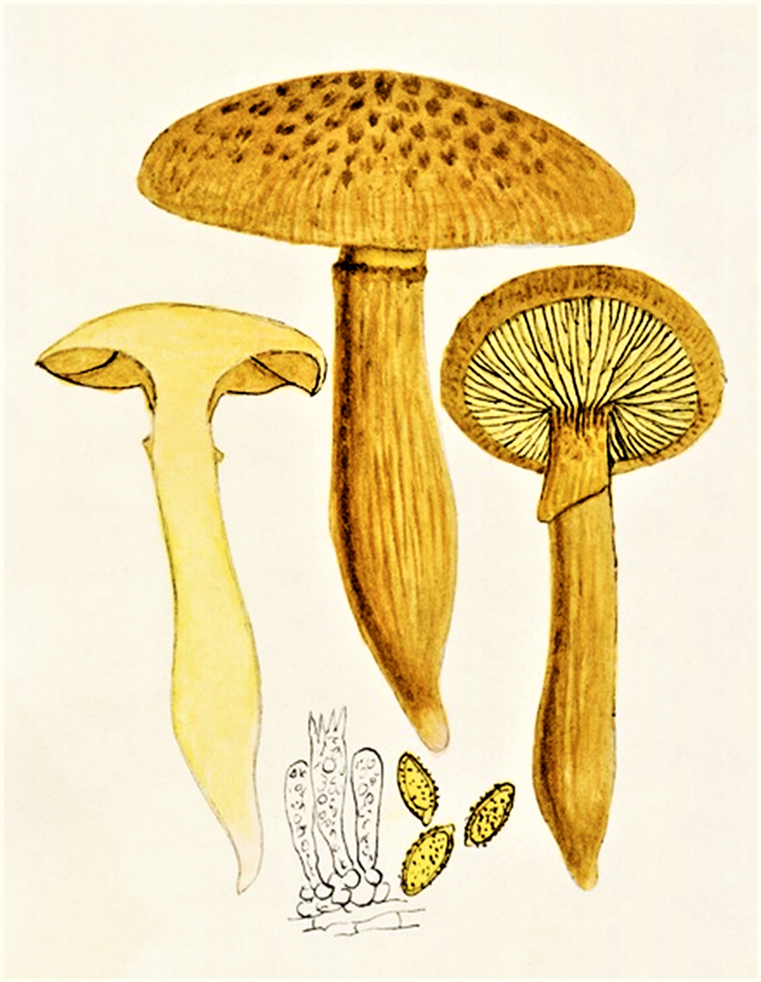 Giacomo Bresadola: Pholiota spectabilis Fr. (1828), heute Phaeolepiota aurea (Matt., 1779) Maire (1928)